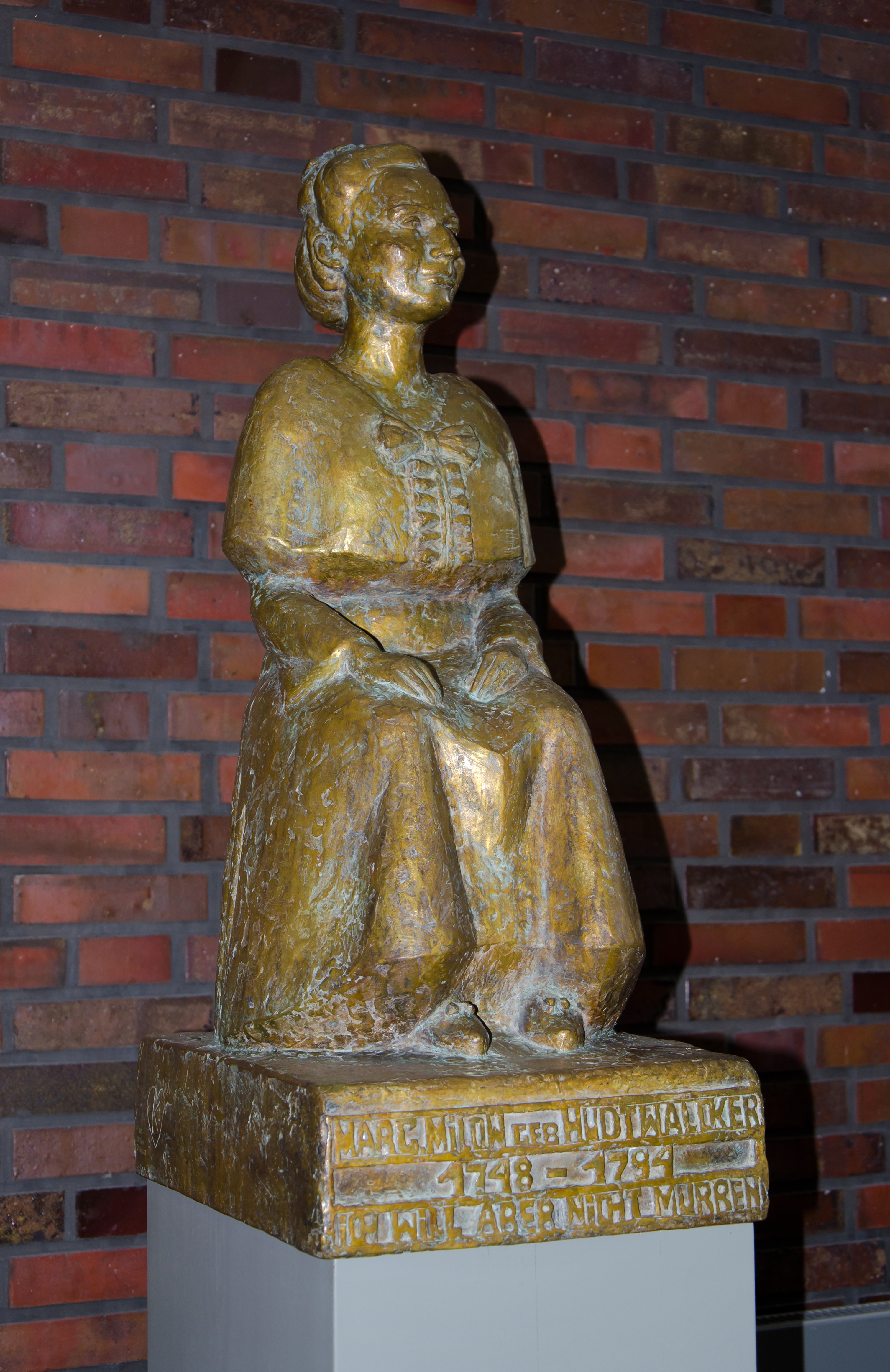 Köster-Stiftung Skulptur für Margarethe Elisabeth Milow